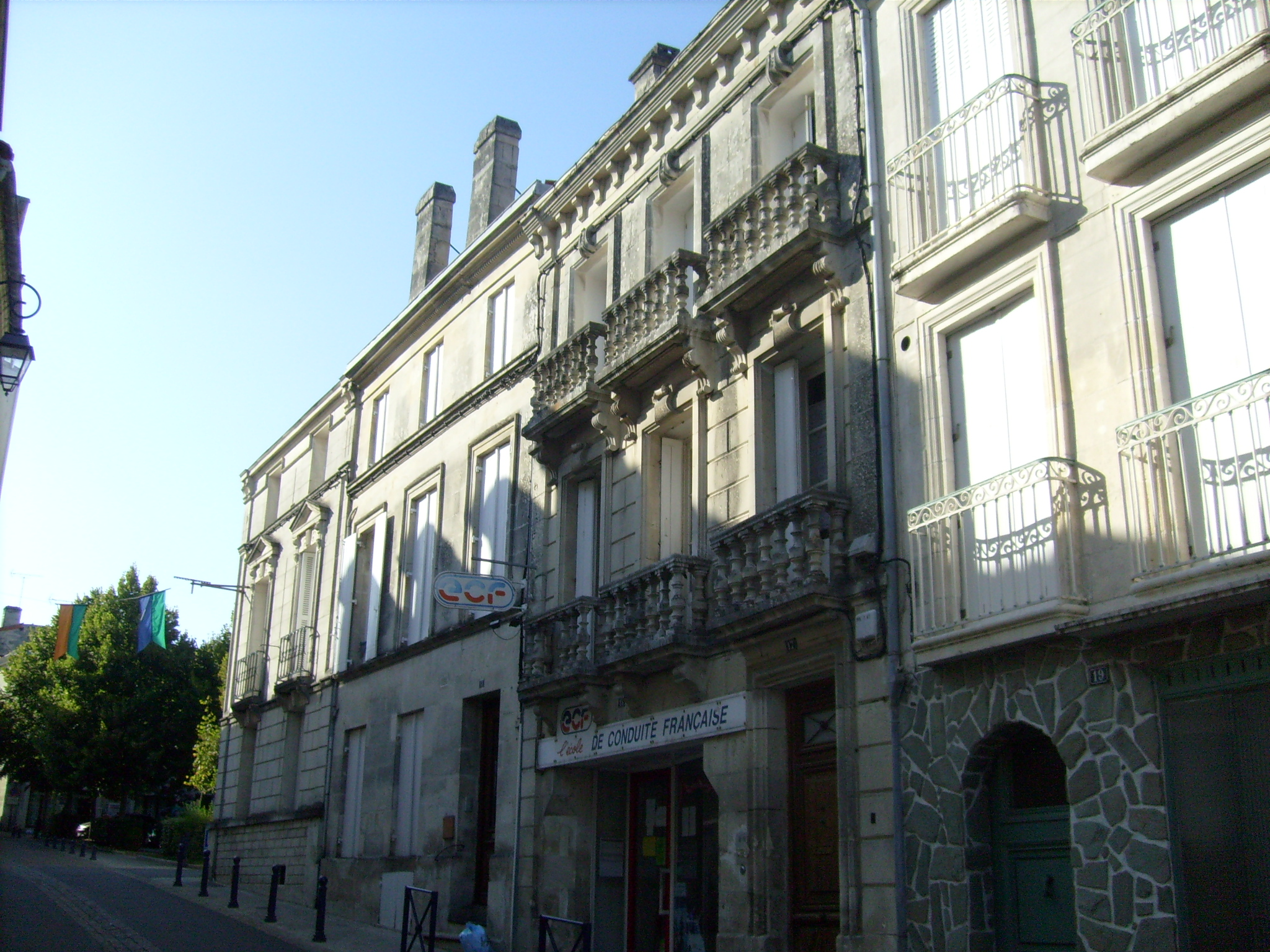 Immeubles anciens à Pons